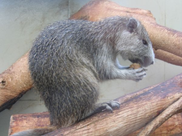 Capromys pilorides (Hutiaconga, familia Capromyidae)